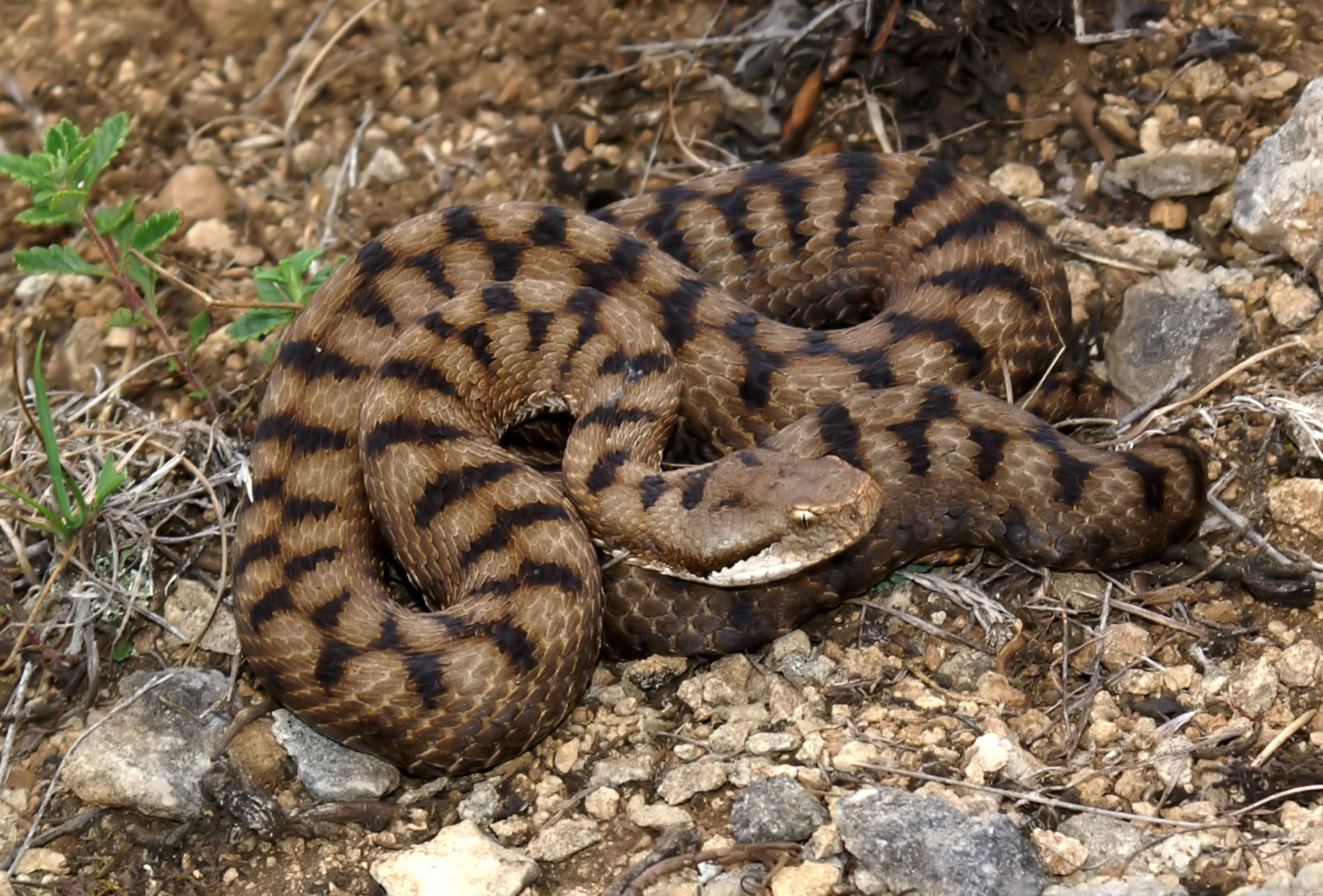 Vipera aspis female - adult